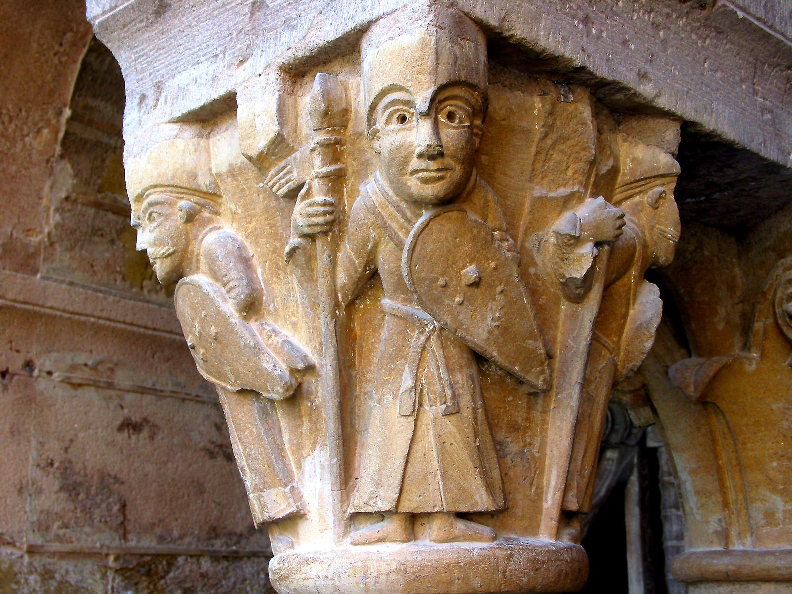 Conqes, (Aveyron - France), chapiteau sculpté du cloître de l'abbatiale Ste-Foy (XIe siècle).